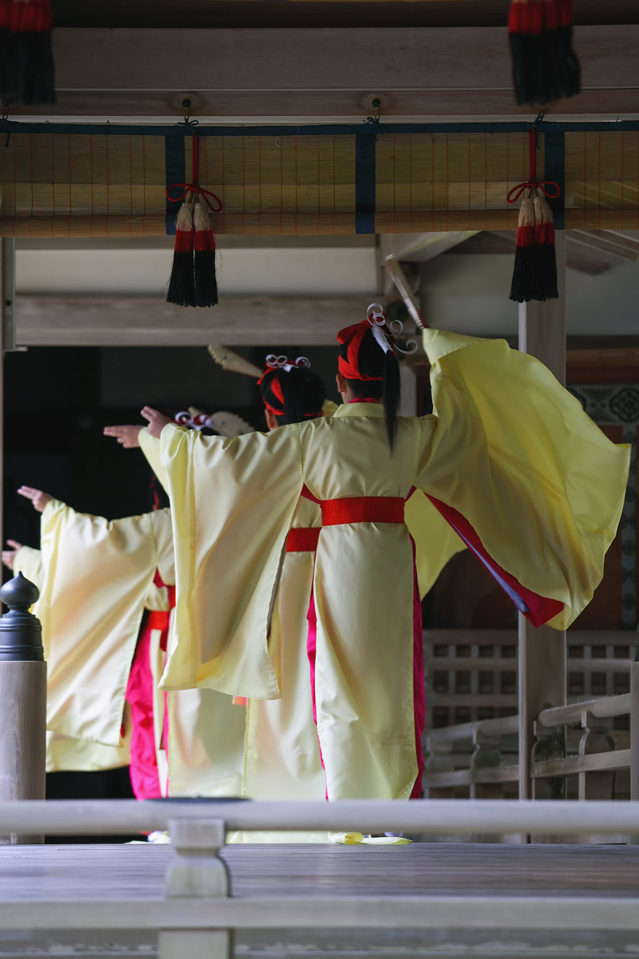 越後一宮彌彦神社の妻戸大神例祭（妃神例祭）に舞殿で奏される、舞楽「大々神楽」の「かん珠」（稚児舞四人）。国重要無形民俗文化財に指定されている。